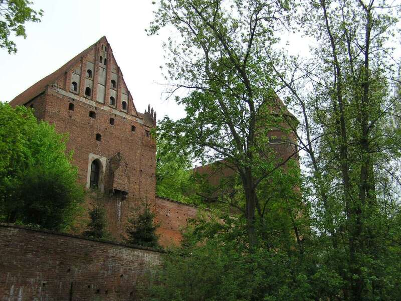 Olsztyn, ul. Zamkowa 2 - Zamek Kapituły Warmińskiej